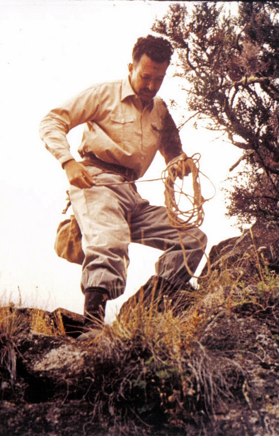 Huberto Cuevas Acevedo en la década de los '50